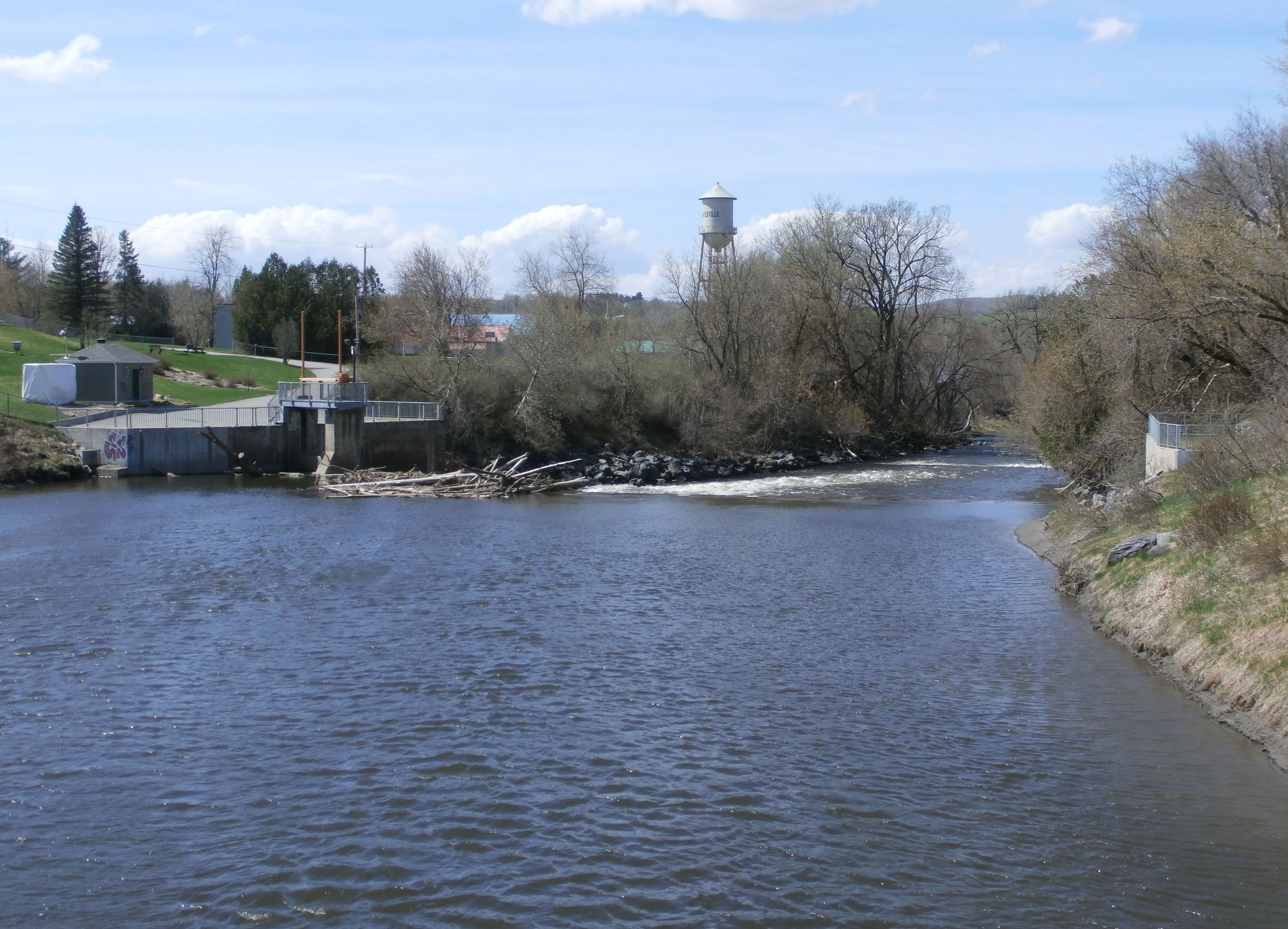 Barrage désaffecté au centre de Waterville sur la rivière Coaticook.